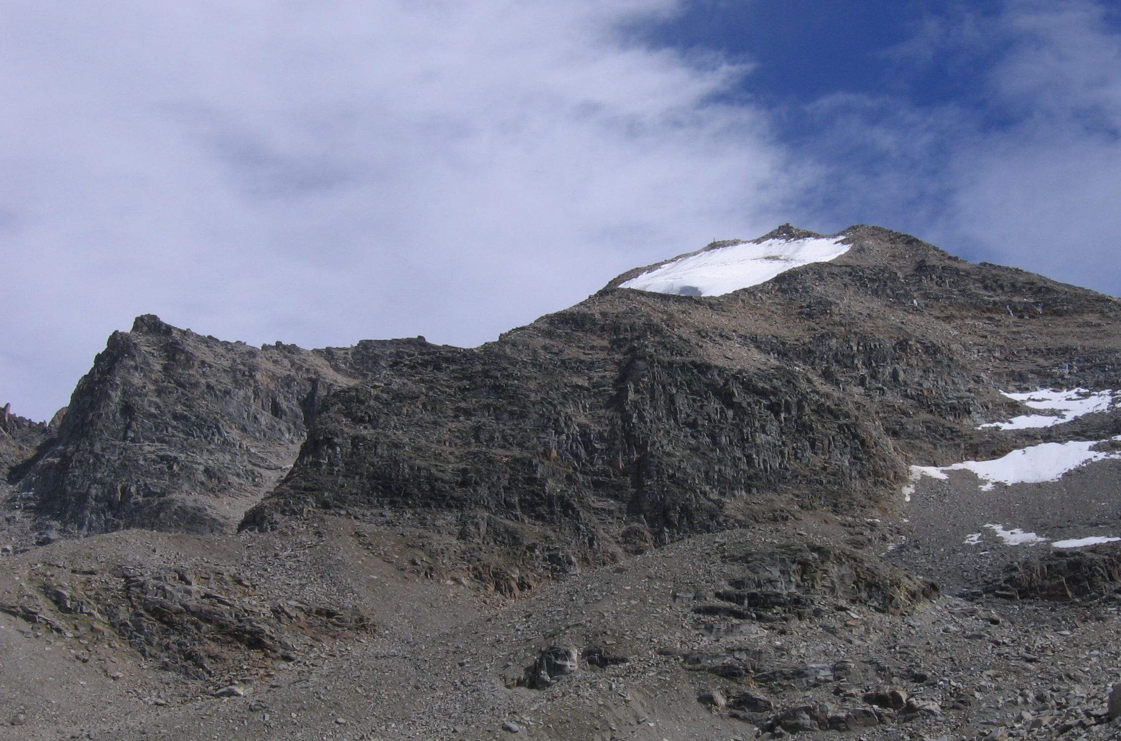 Hoher Angelus aus Richtung Düsseldorfer Hütte